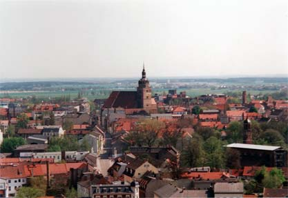 Das Weichbild der Alt- und Neustadt Brandenburg an der Havel Juno 2001 vom Marienberg aus gesehen